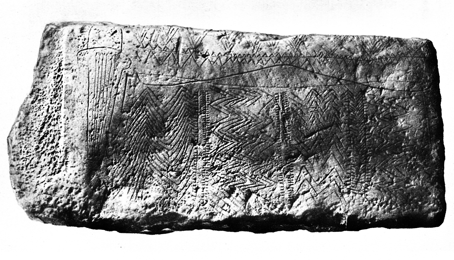 Grabplatte aus einer neolithischen Steinkiste bei Göhlitzsch, Salzmünder oder Bernburger Kultur, Landesmuseum für Vorgeschichte Halle